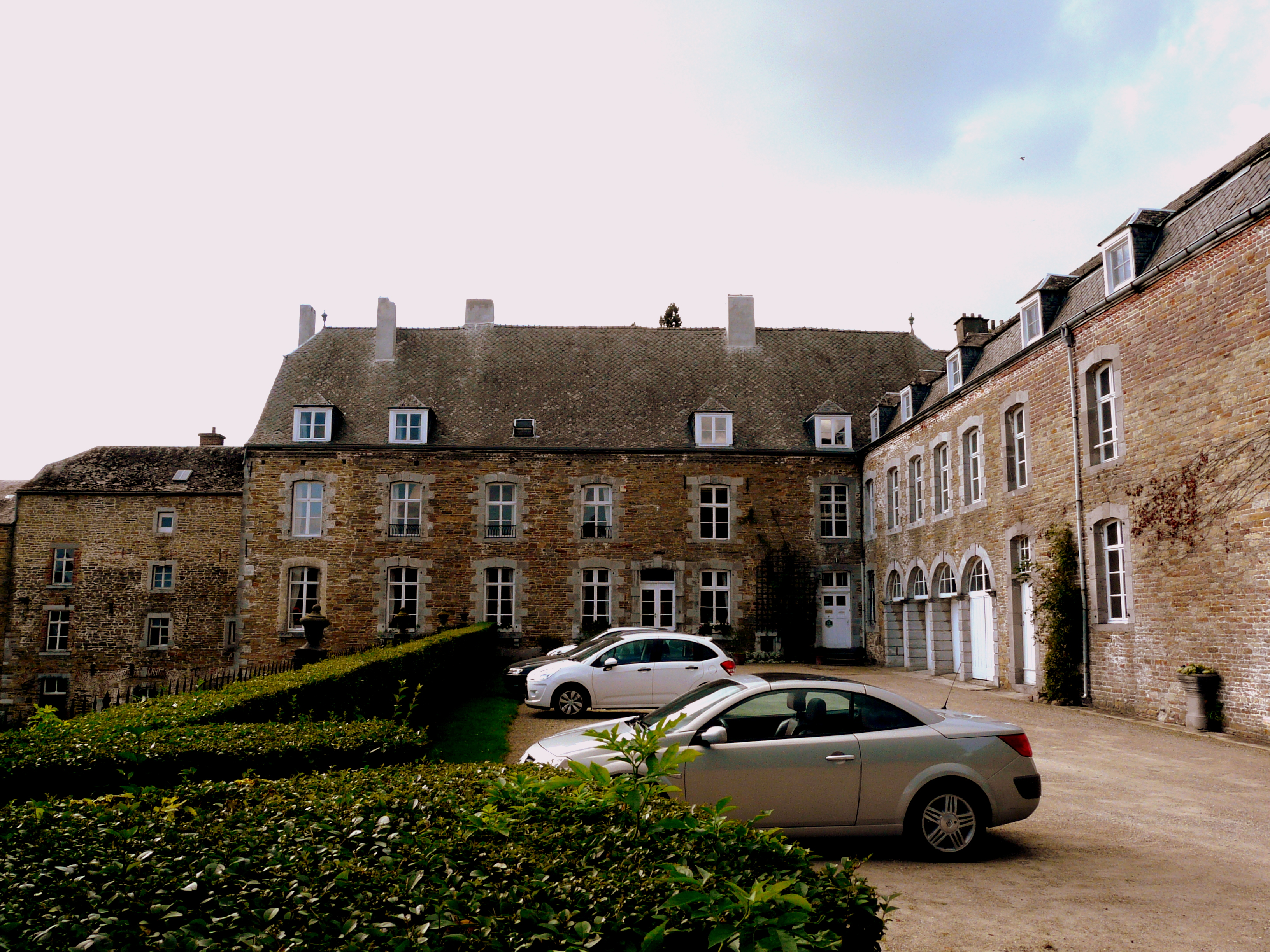 Façades extérieures, toitures et stucs Louis XVI décorant la Chambre Monseigneur, pièce avec alcôve dans l'aile accolée à gauche du volume principal côté jardin